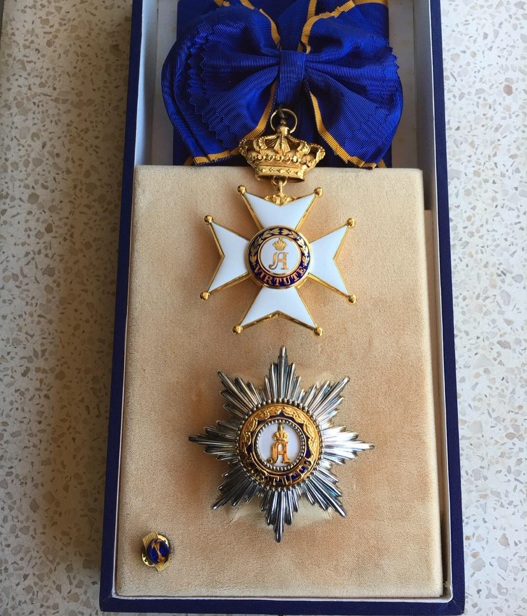 Ensemble de Grand-Croix de l'Ordre d'Adolphe de Nassau, Grand Duché de Luxembourg. Version civile.